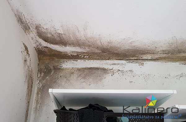 Primer plesni v kotu, ki je posledica toplotnega mostu.